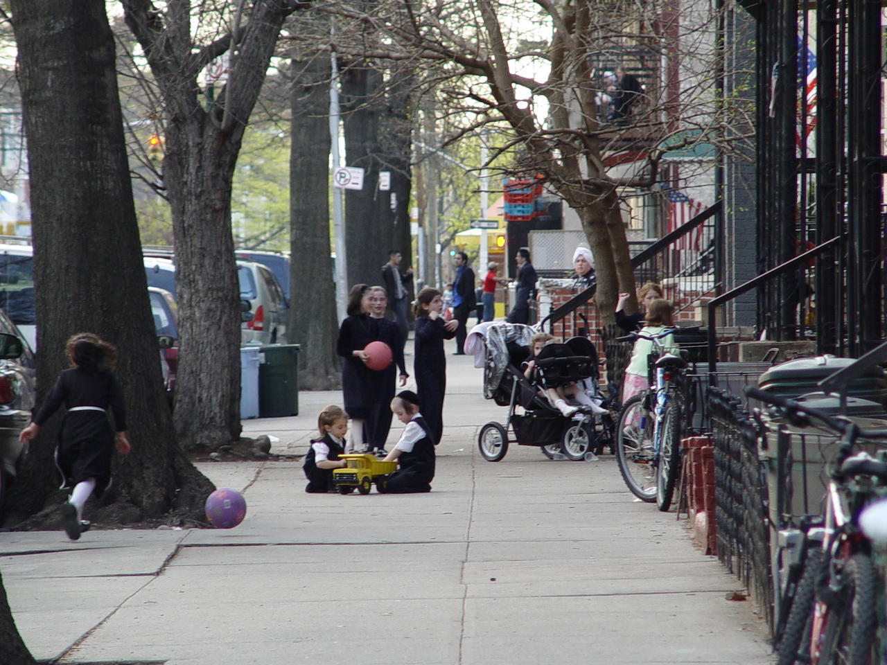 Haszid gyerekek, Borough Park, Brooklyn, New York, USA